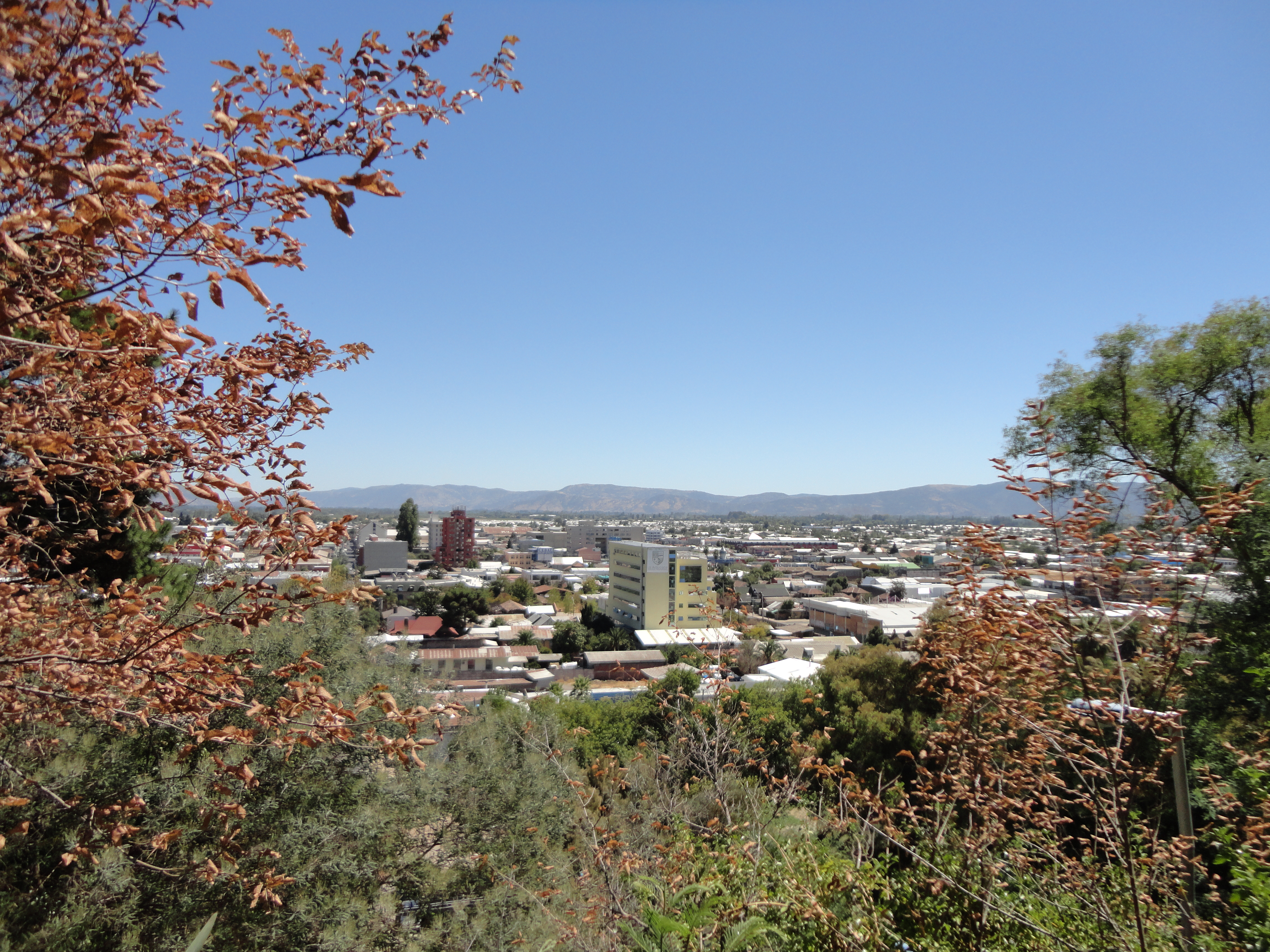 Ciudad de Curico Desde las Alturas